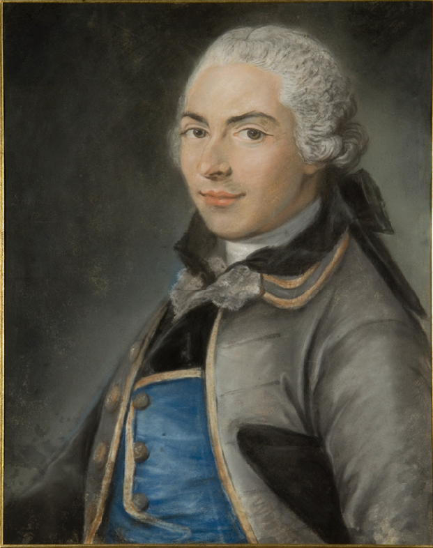 Portrait en buste de l'homme d'affaires & abolitioniste de l'esclavage André-Daniel Laffon de Ladebat, de trois-quarts. Réalisé en 1763 par Suzanne Caron. Musées de Bordeaux.